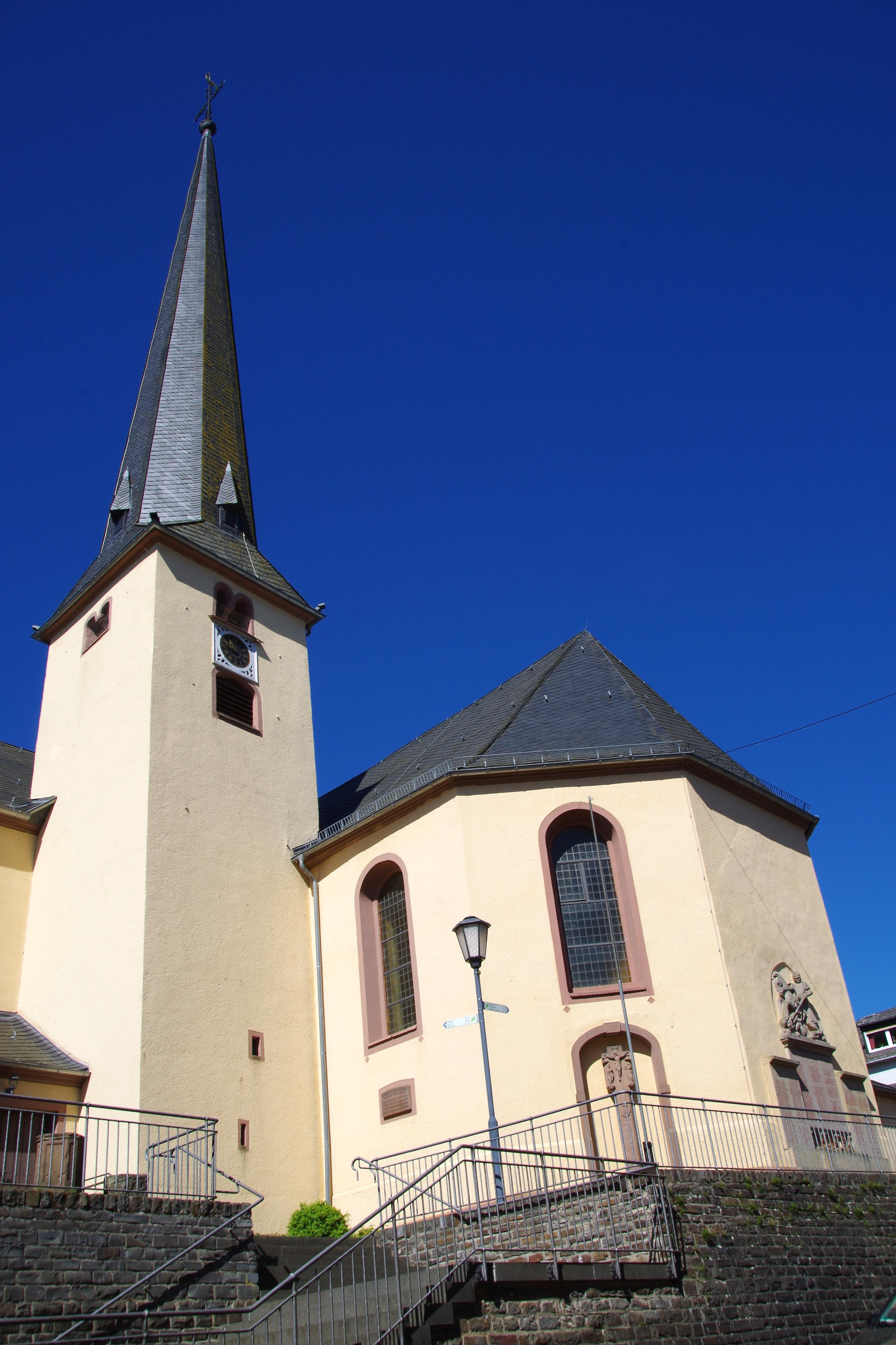 Waxweiler, Katholische Pfarrkirche St. Johannes Baptist, Außenansicht